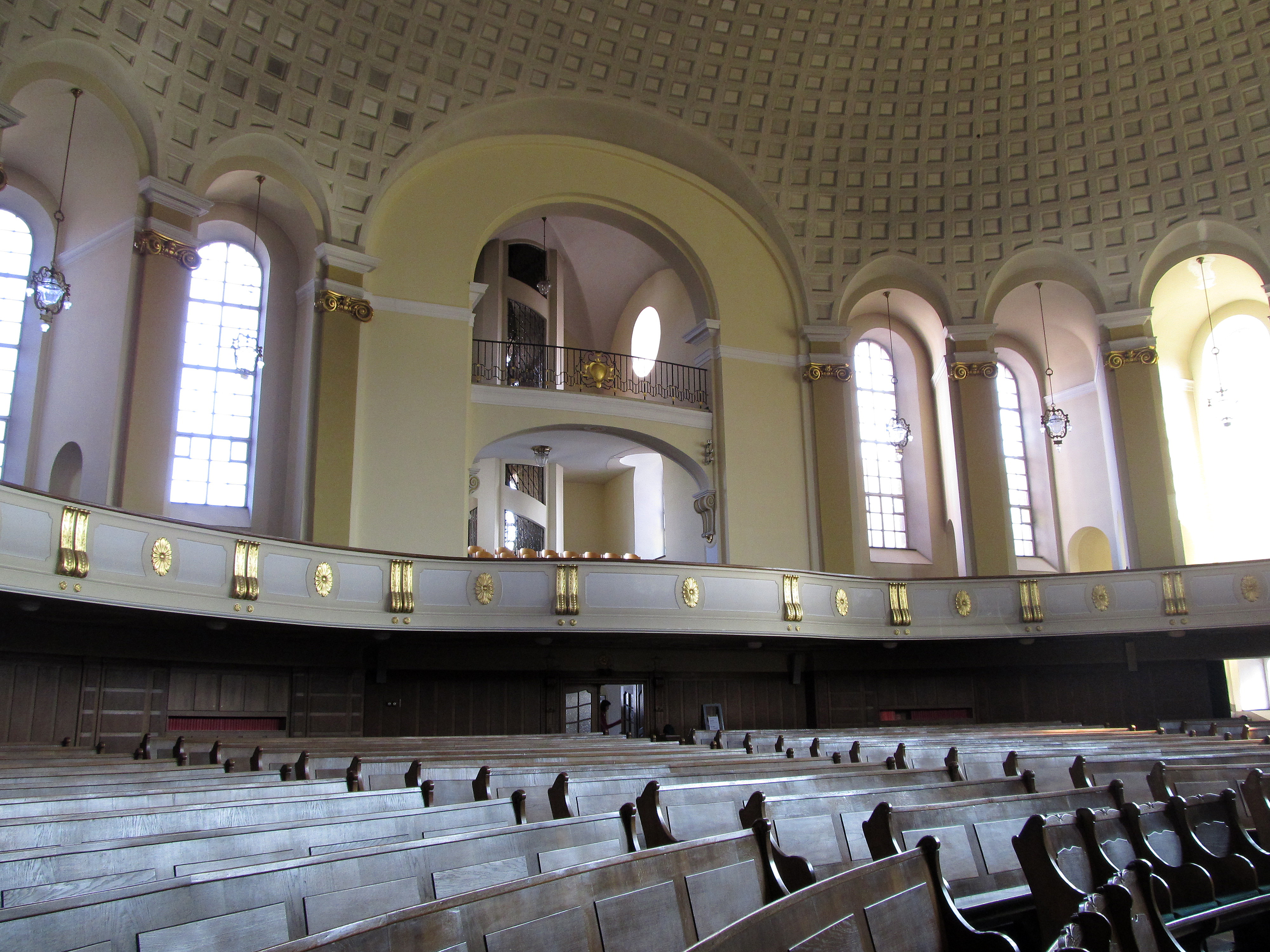 Blick ins Innere der evangelischen Versöhnungskirche in Völklingen, Saarland